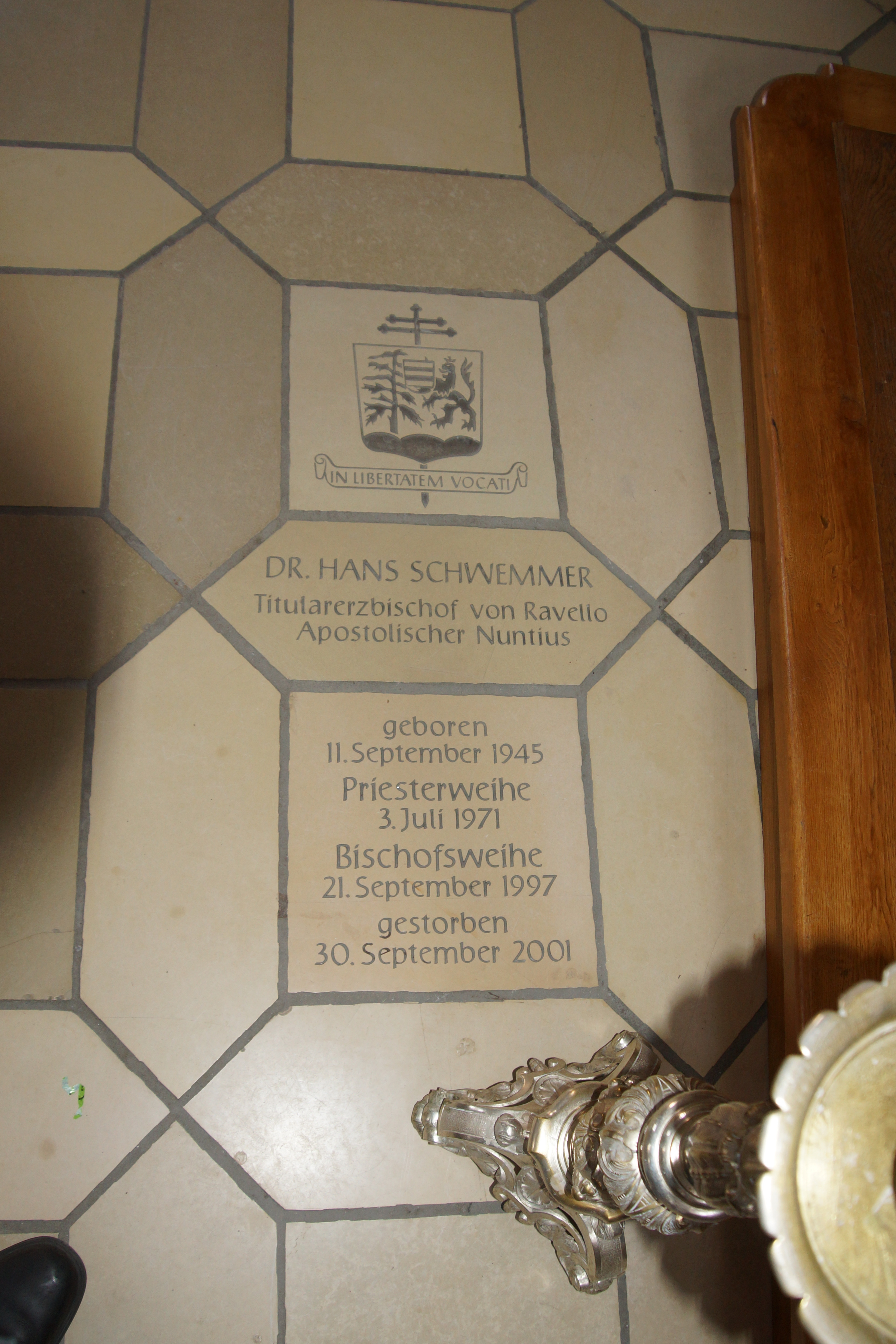 Die katholische Pfarrkirche St. Georg in Pressath